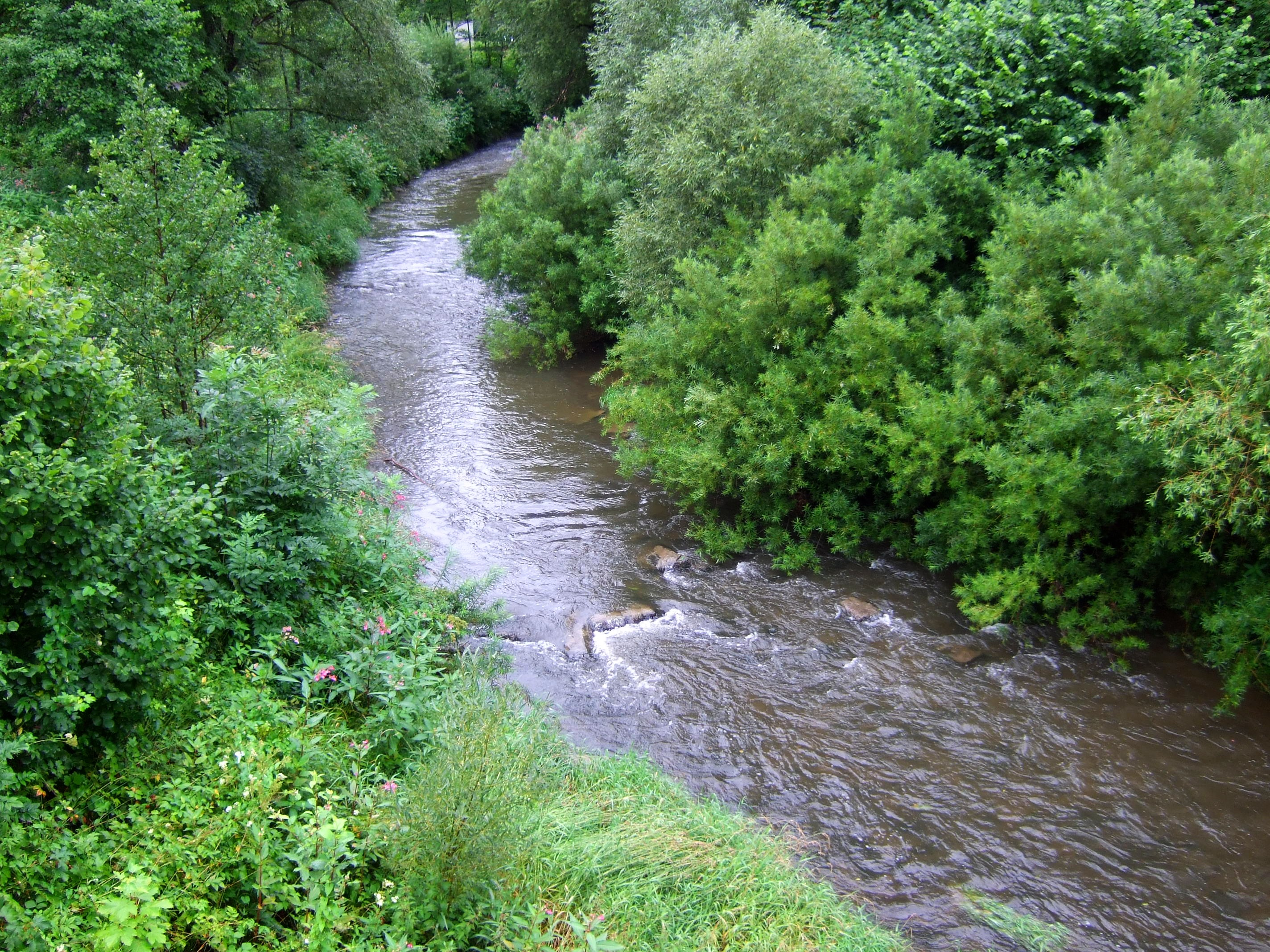 Die Eschach vor Bühlingen